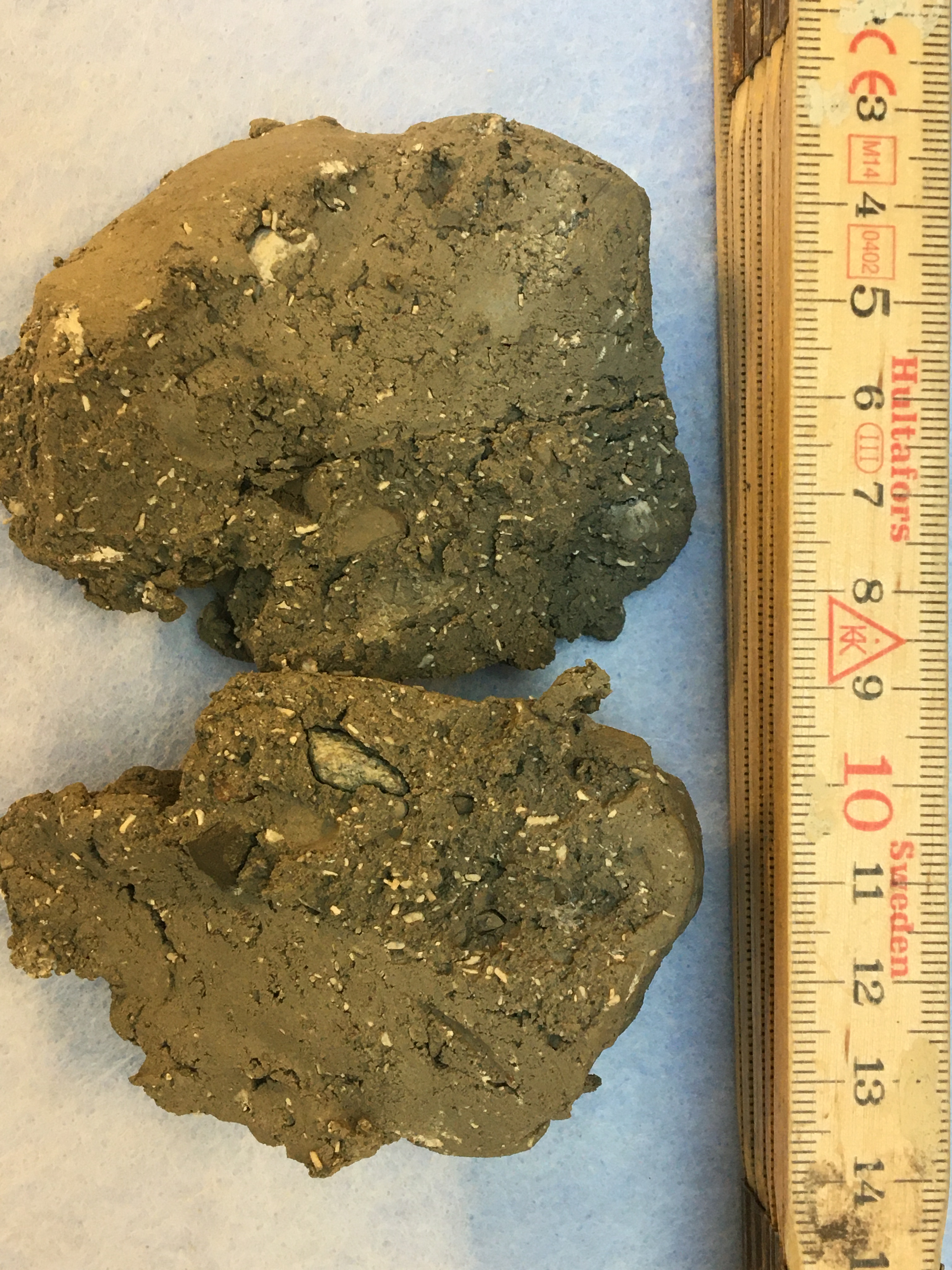 Moræneler med bryozostumper